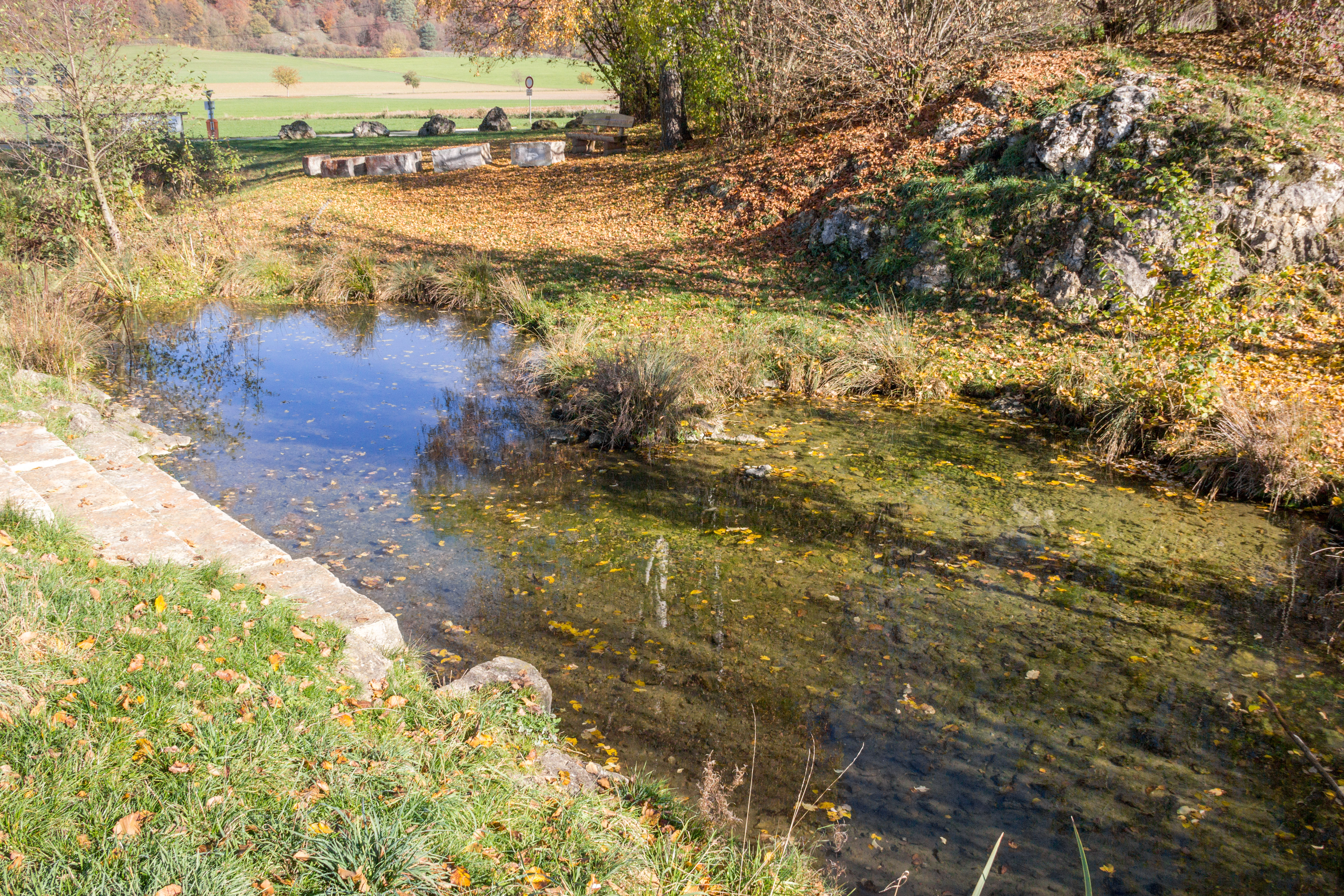 Wellheim, Schutterquelle, Geotop